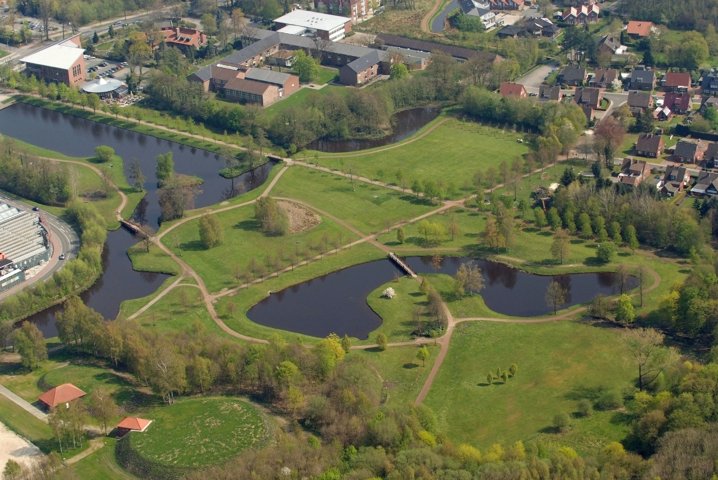 Stadtpark Papenburg / Fotoflug von Nordholz-Spieka nach Oldenburg und Papenburg